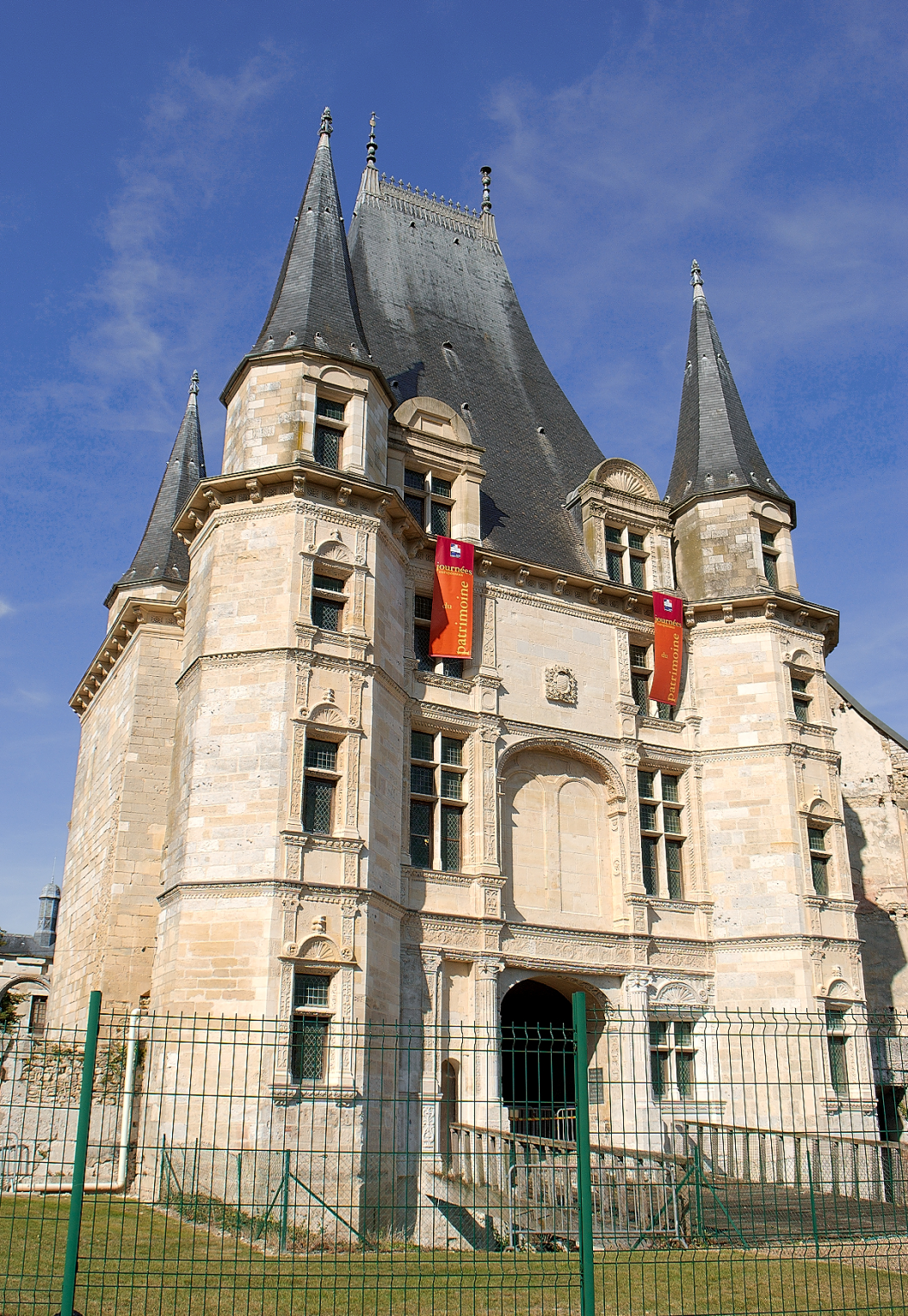 Pavillon d'entrée du château de Gaillon. Décor Renaissance (début XVIe siècle)